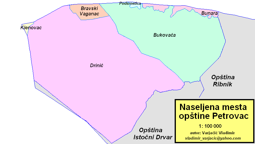 Opština Petrovac